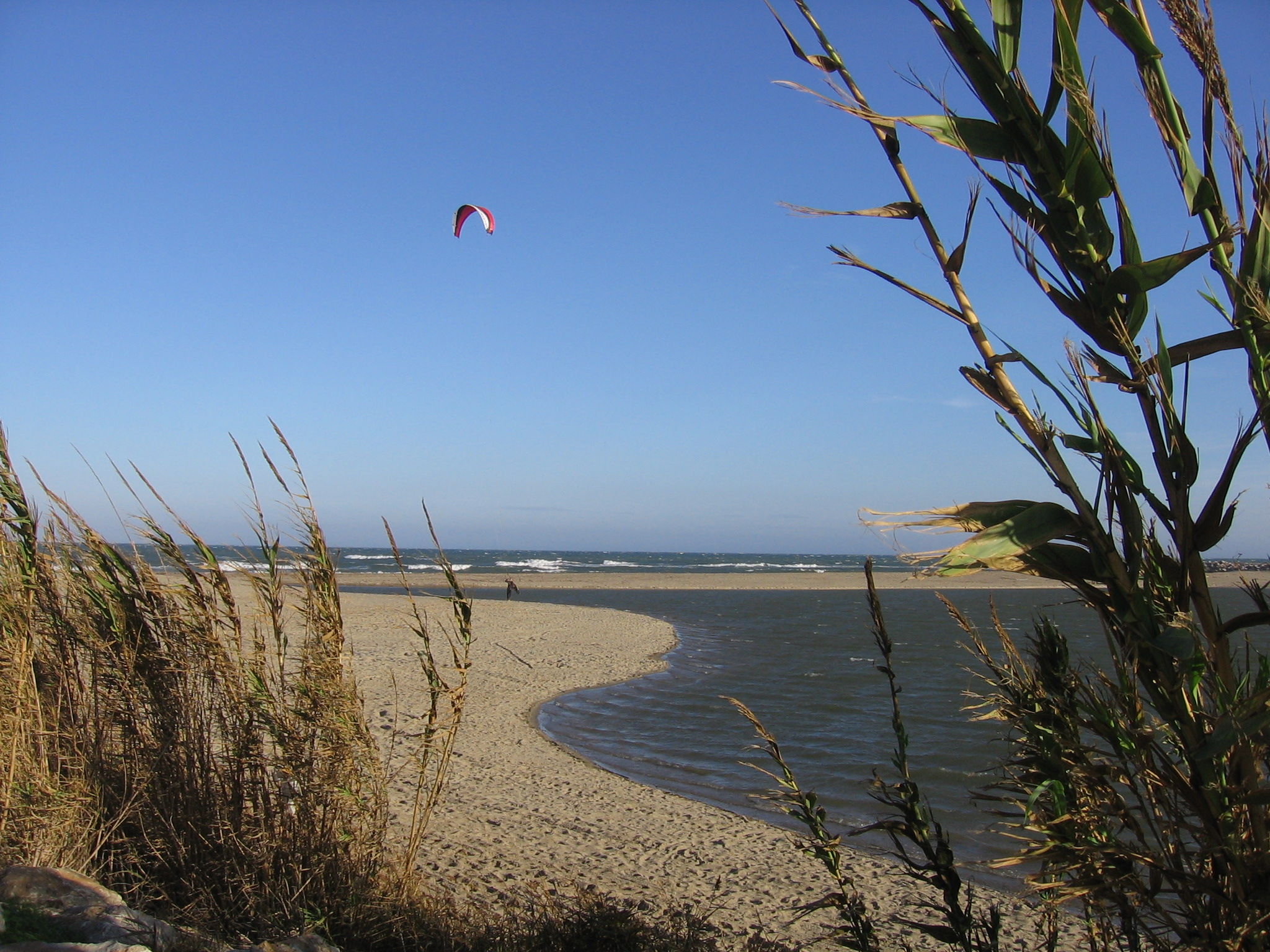 photo perso prise en octobre 2005 a l'embouchure de l'Agly